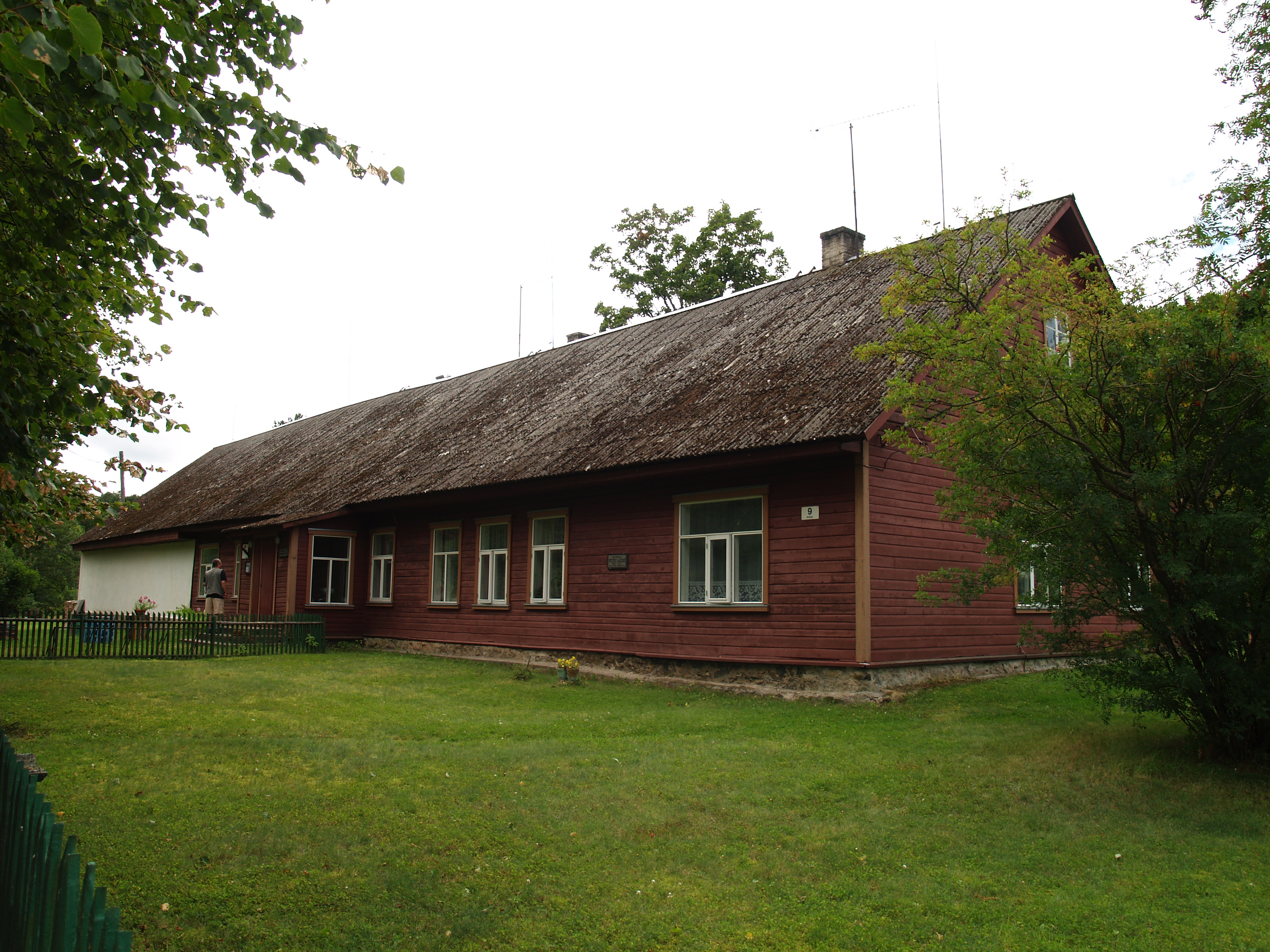 Häädemeeste muuseum